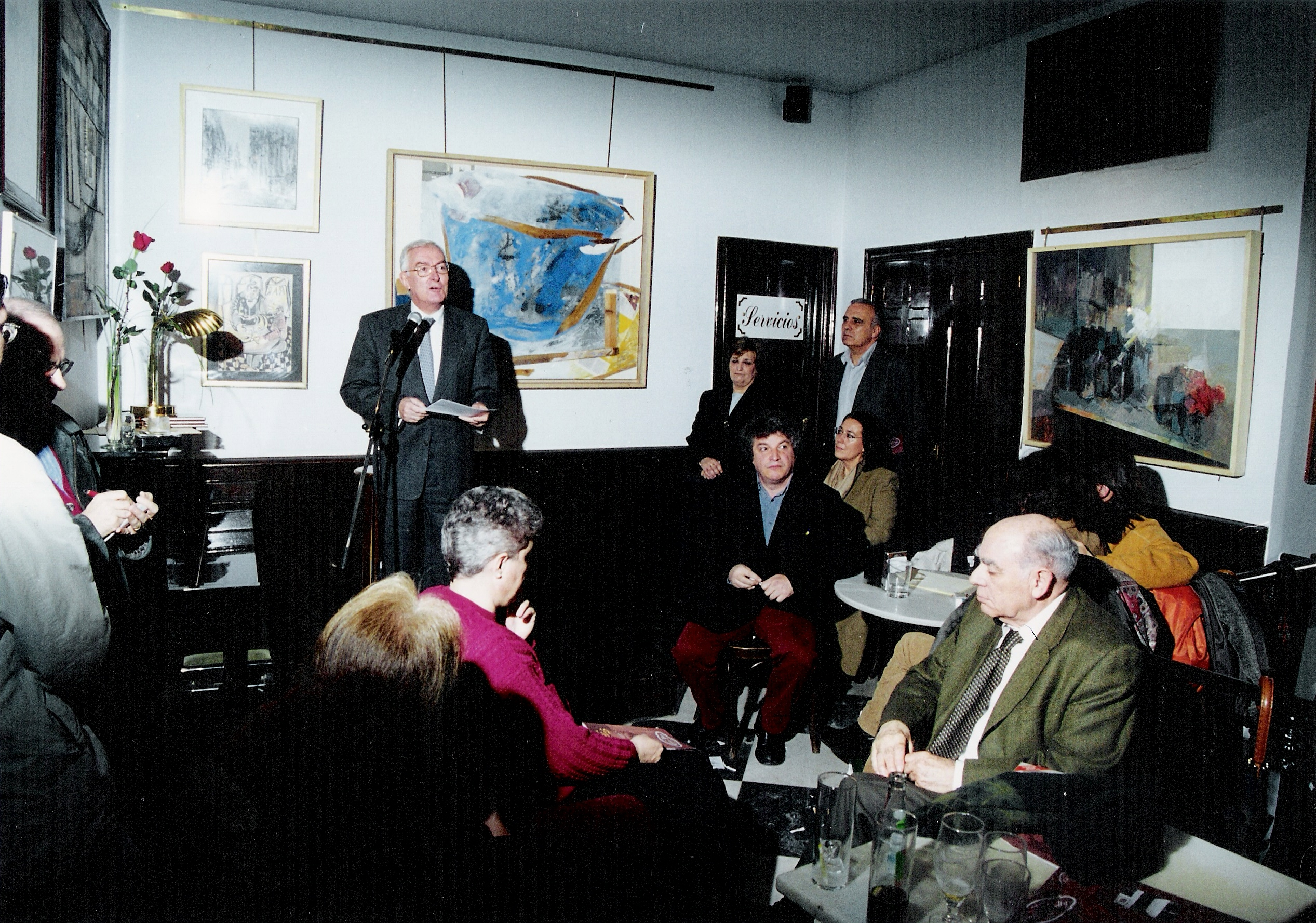 Víctor García de la Concha hablando en el Café Novelty de Salamanca en 1995. En la foto se ve al poeta Paco Novelty con pantalón granate, al escritor Manuel Fernández Álvarez de lado en primer plano y al fondo a la familia Novelty.